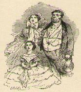 Les ridicules Tourneboule, illustration de Bertall pour Les Vacances (1859) de la comtesse de Ségur, Bibliothèque rose.